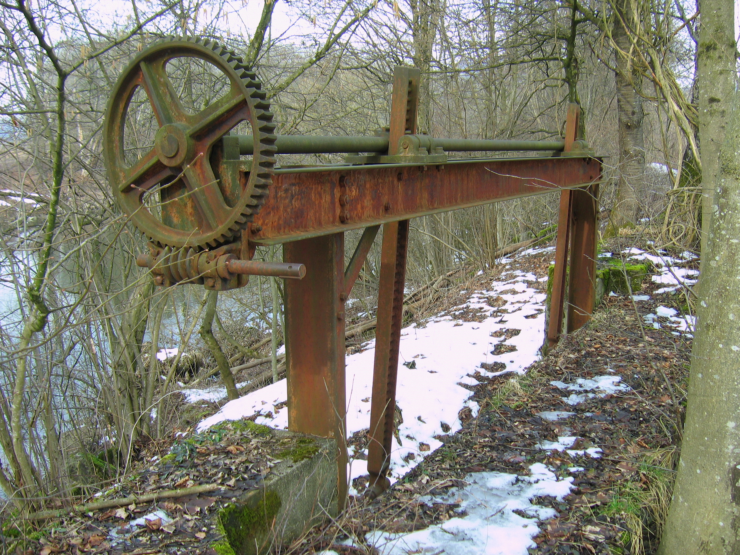 Deutschland - Baden-Württemberg - Bodenseekreis: Ehemaliges Auslasswehr an der Argen zum Kochermühlengraben